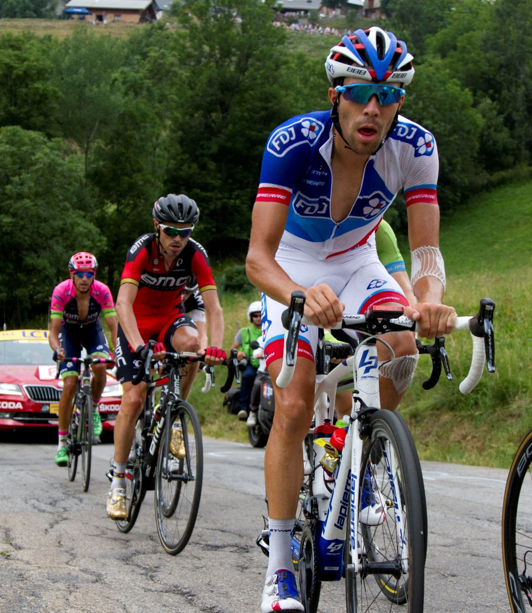 182 pinot en sanchez